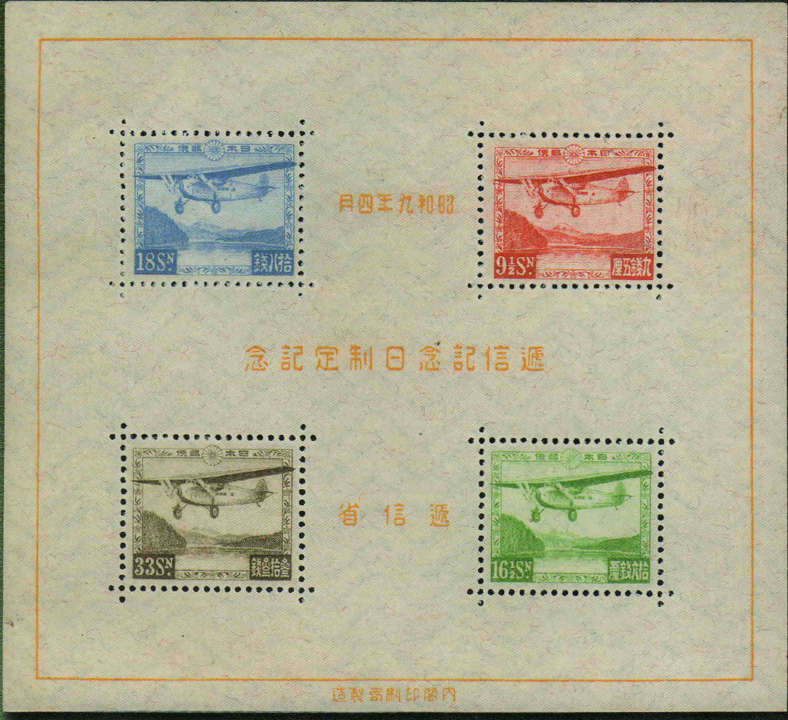 4月20日は日本の郵政事業創業の記念日であるが、1934年にはじめて「逓信記念日」と制定されたが、この画像は「制定記念」として発行された小型シートのものである。